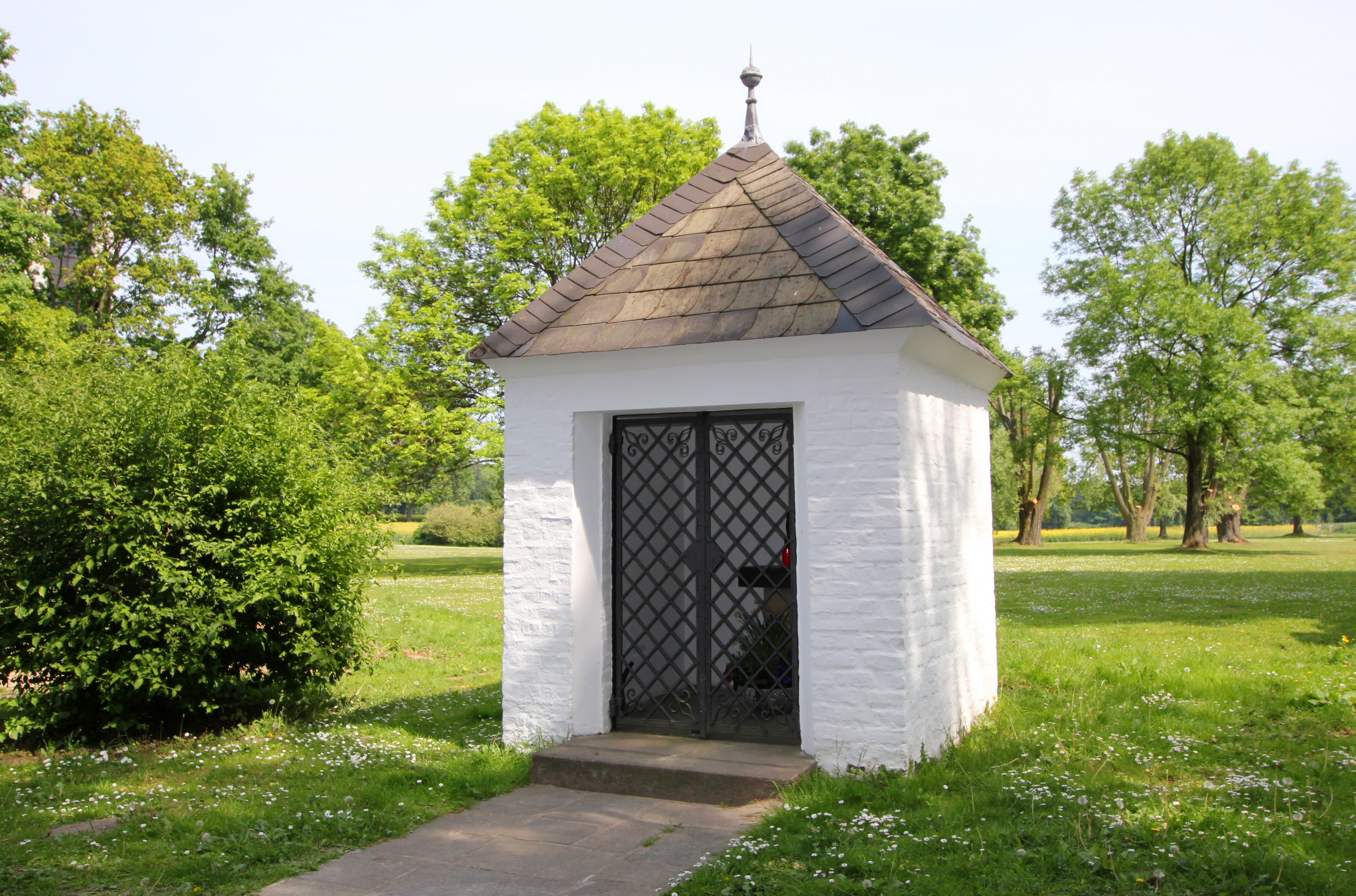 Wegekapelle Stüttgenweg vor dem Stüttgenhof. Die Kapelle steht im Gegensatz zur Hofanlage auf Köln-Lindenthaler Gebiet